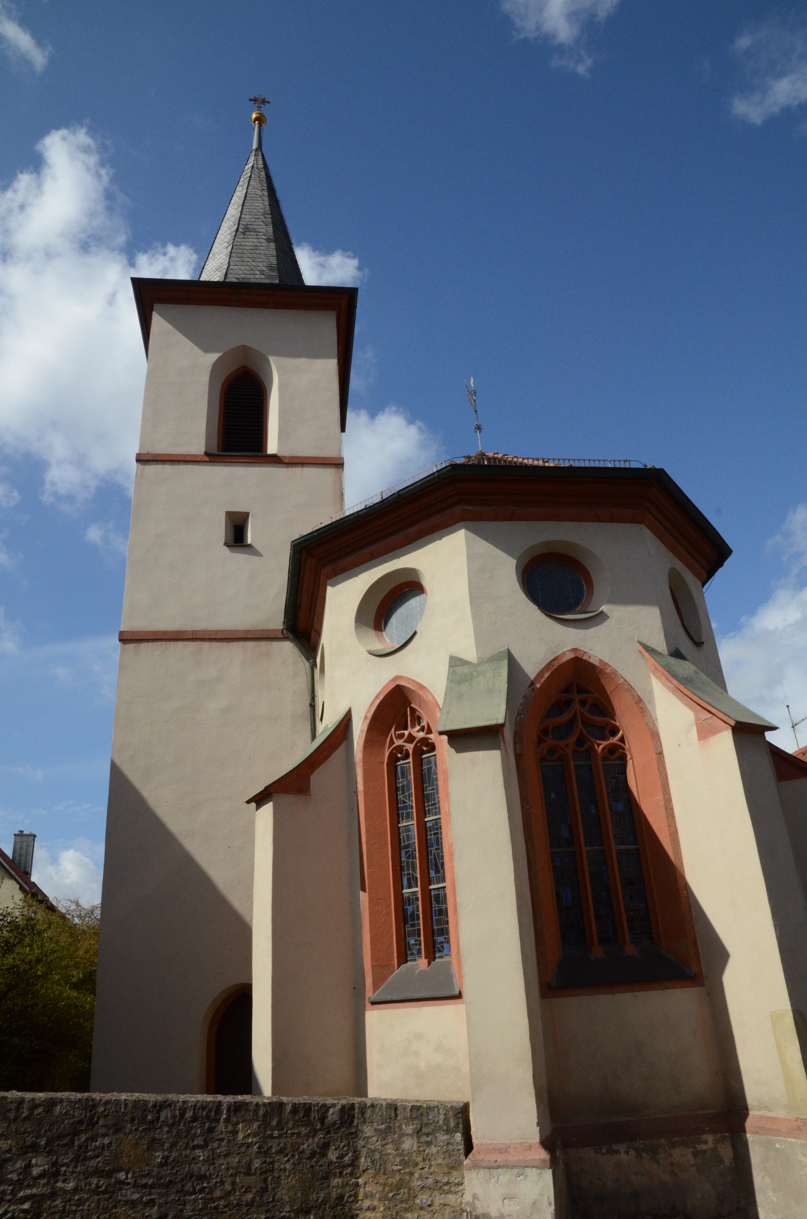 evang.-luth. Pfarrkirche St. Georg in Thüngen